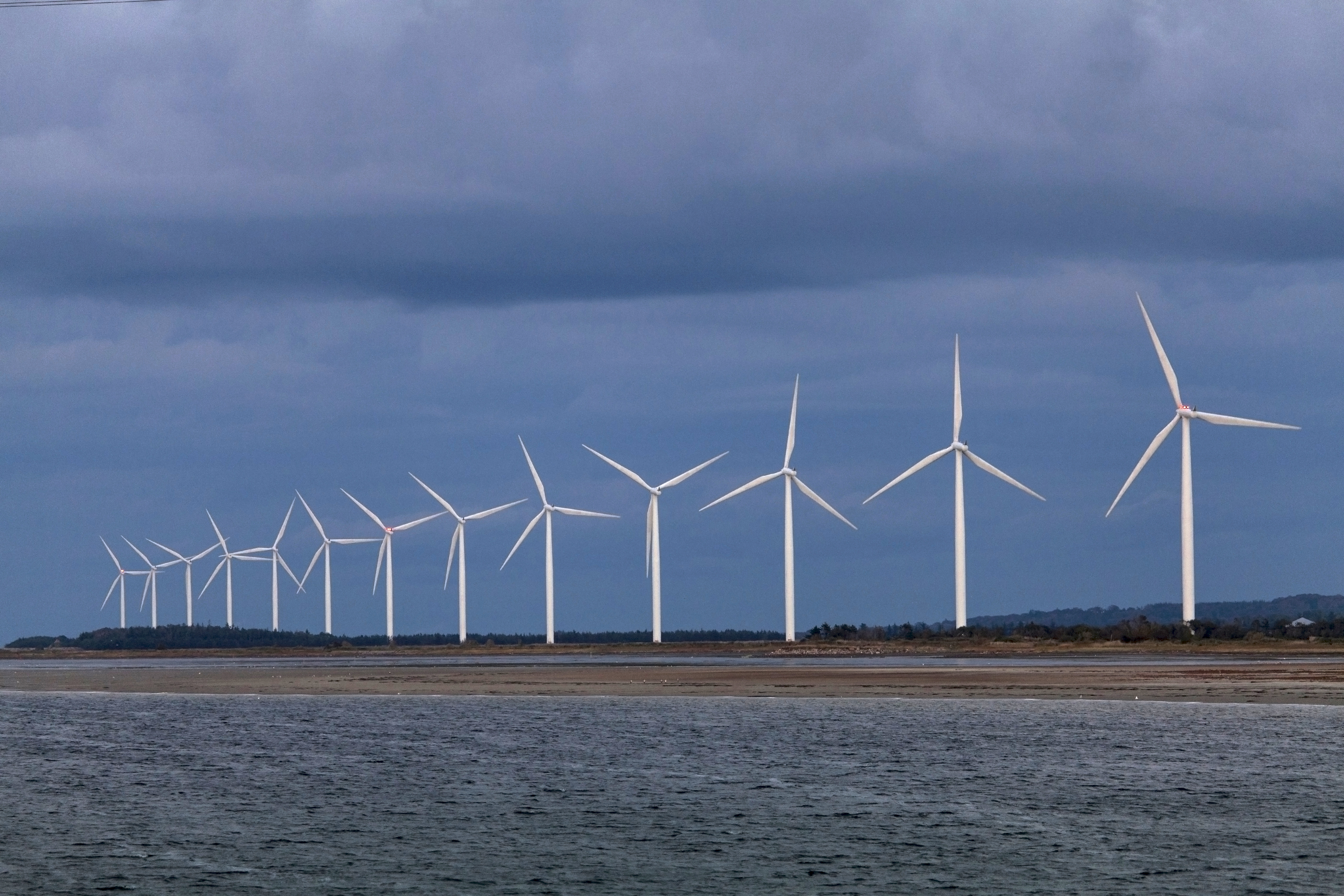 Vindmøller (wind turbines) ved Aggersund vindkraftpark, Jylland (Jutland), Danmark (Denmark) fotograferade 20130930. Photo: News Øresund - Johan Wessman © News Øresund Detta verk av News Øresund är licensierat under en Creative Commons Erkännande 3.0 Unported-licens (CC BY 3.0). Bilden får fritt publiceras under förutsättning att källa anges (Foto: News Øresund + fotografnamn). The picture can be used freely under the prerequisite that the source is given . News Øresund, Malmö, Sweden. News Øresund är en oberoende regional nyhetsbyrå som ingår i projektet Øresund Media Platform som drivs av Øresundsinstituttet i partnerskap med Lunds universitet och Roskilde Universitet och med delfinansiering från EU (Interreg IV A Öresund) och 14 regionala; icke kommersiella aktörer.